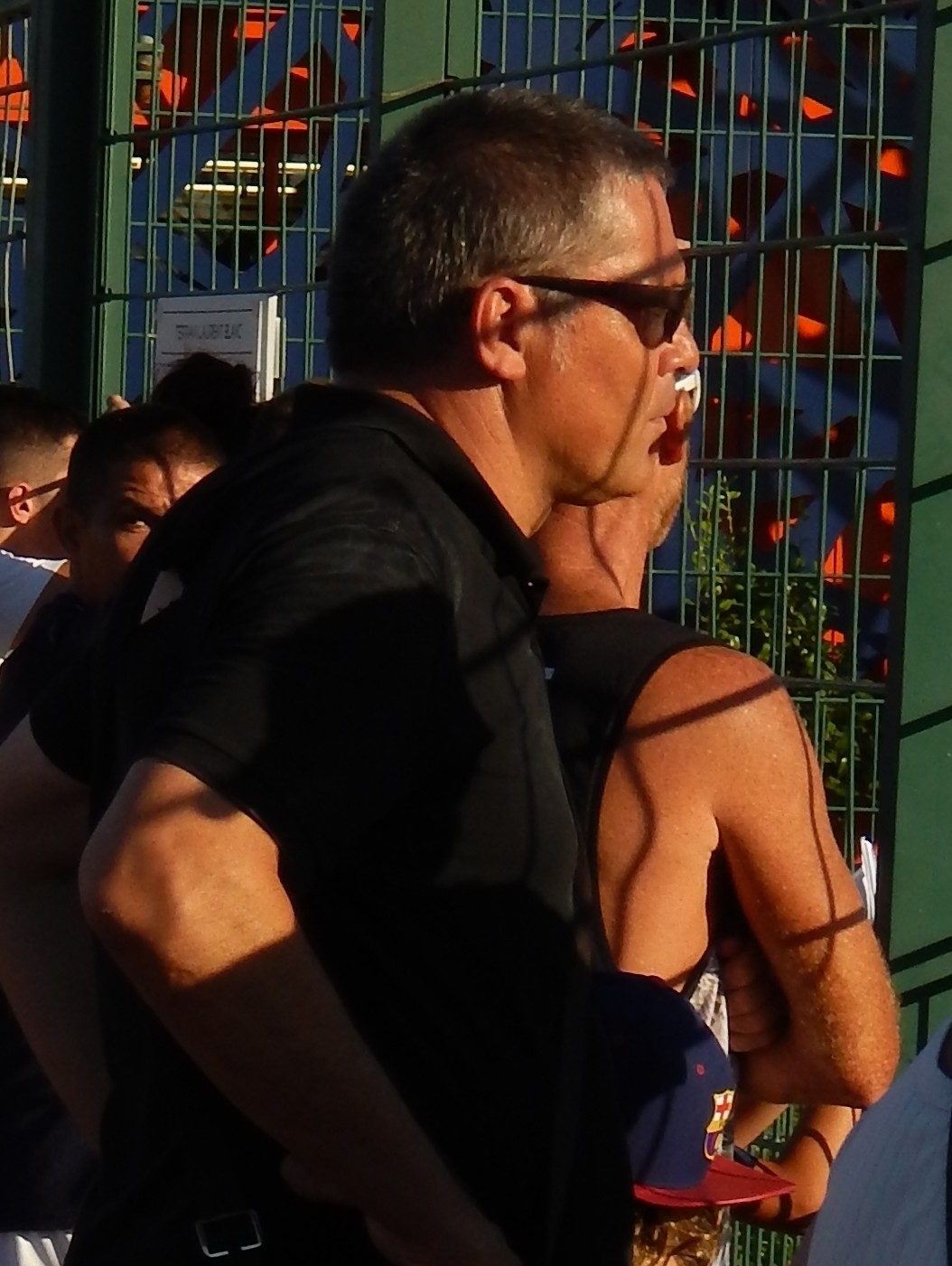 Bruno Martini, lors d'un entraînement du MHSC, en juillet 2015.